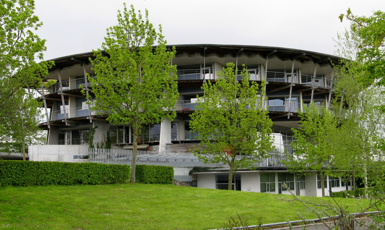 Gebäude der Data-Group in Pliezhausen-Gniebel (Wilhelm-Schickard-Straße 7)